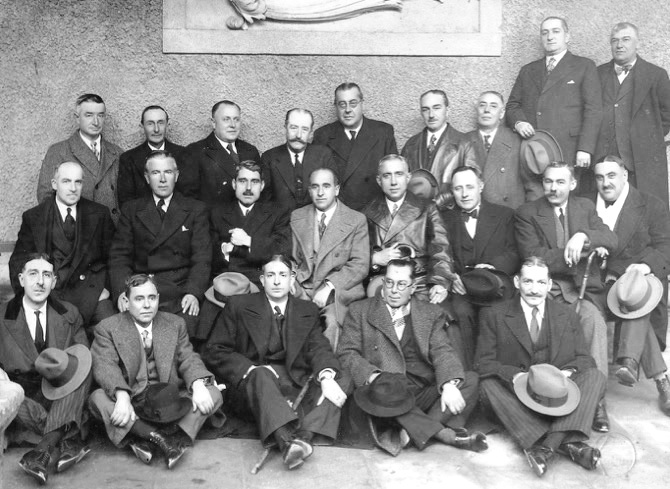 Vodas de prata (1932) da promoción de Medicina de 1907 da Universidade de Santiago de Compostela. Na fila do medio Roberto Nóvoa Santos (terceiro pola esquerda) e Alejo Diz Jurado (cuarto pola dereita).